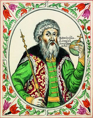 Св. кн. Даниил александрович. Миниатюра из Царского титулярника. 1672-1673 гг. (РНБ. F.IV.764.Л. 30)